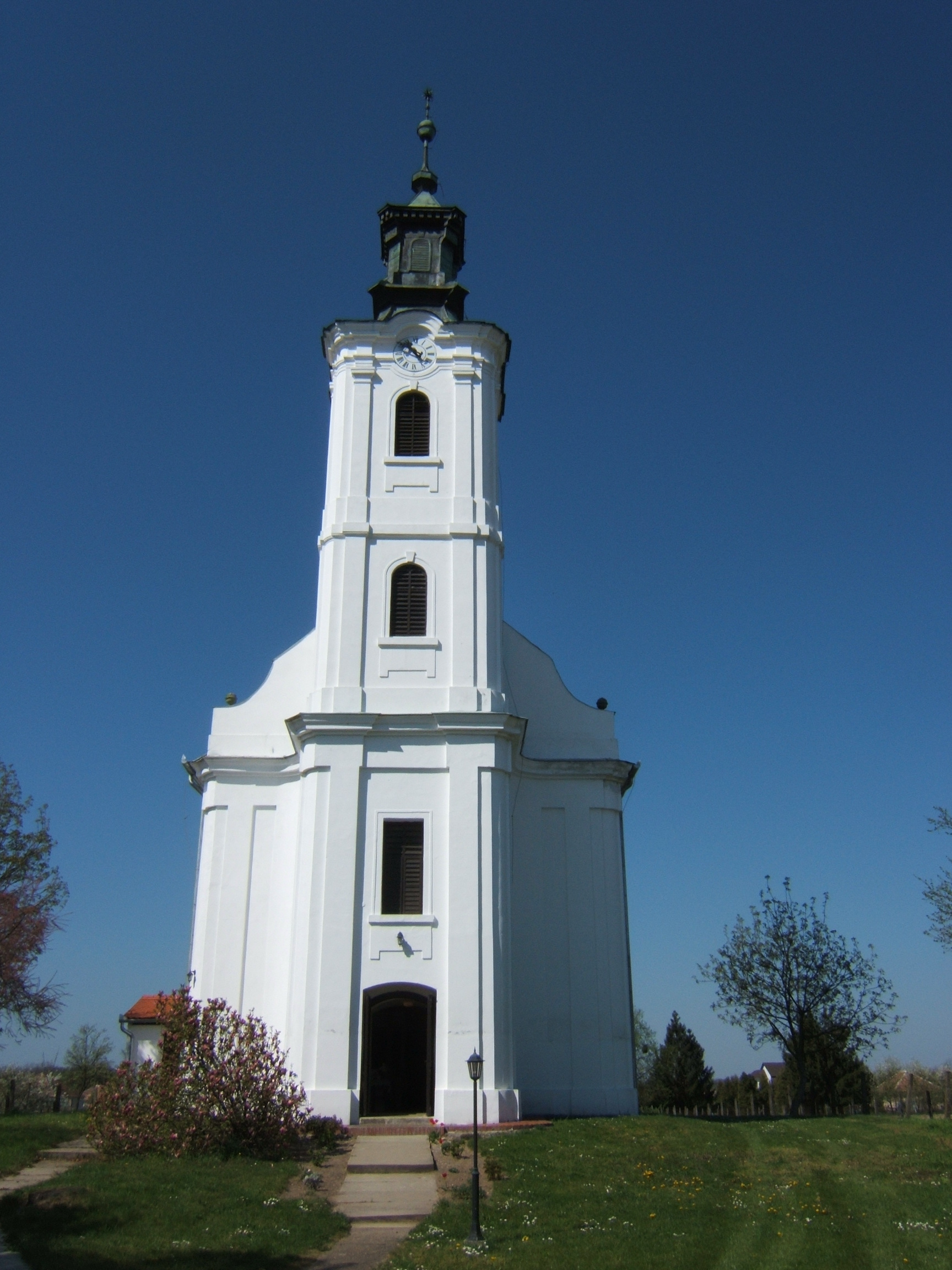 Lábod, templom